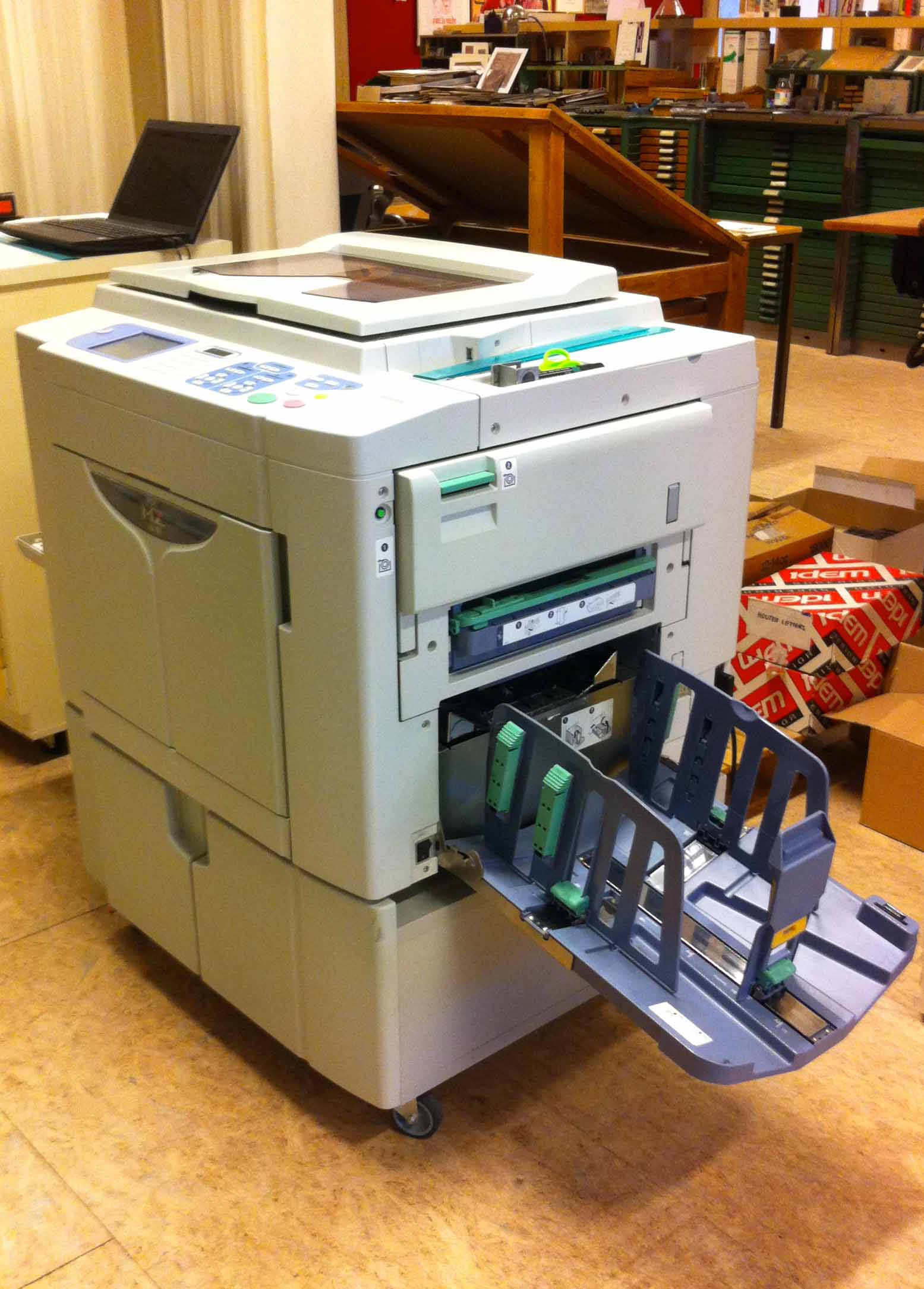 Modèle MZ 1070E, bichromie, format A3. Photo ayant été prise Chez rosi (Bruxelles)